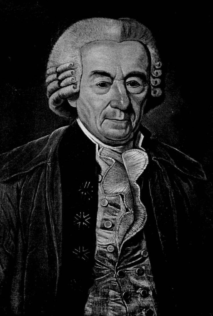 Georg Ludwig Boehmer (1715—1797)